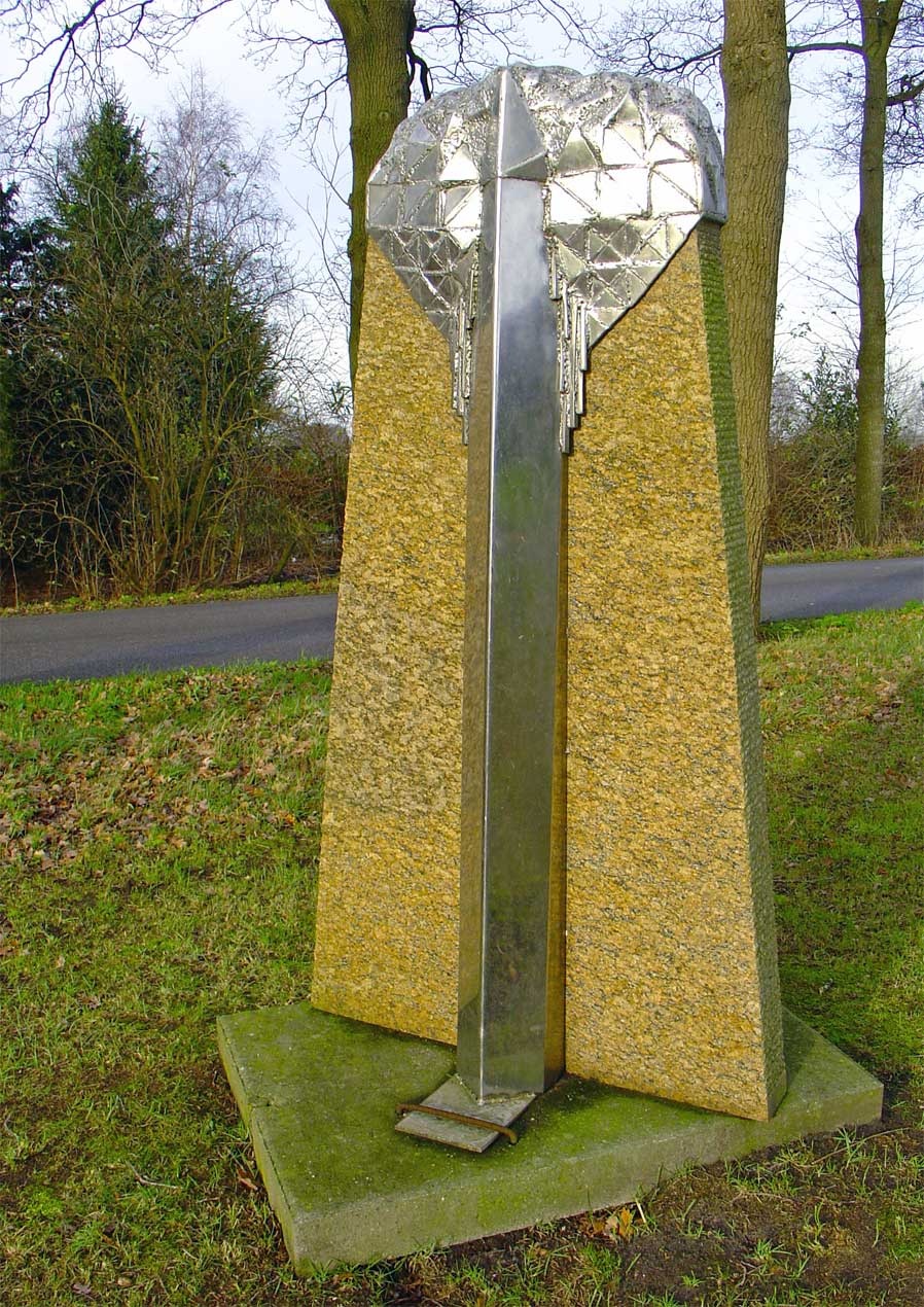 "Zonder titel" beeld van Ko Vester, Oshaar, hoek Oshaarseweg/Traandijk